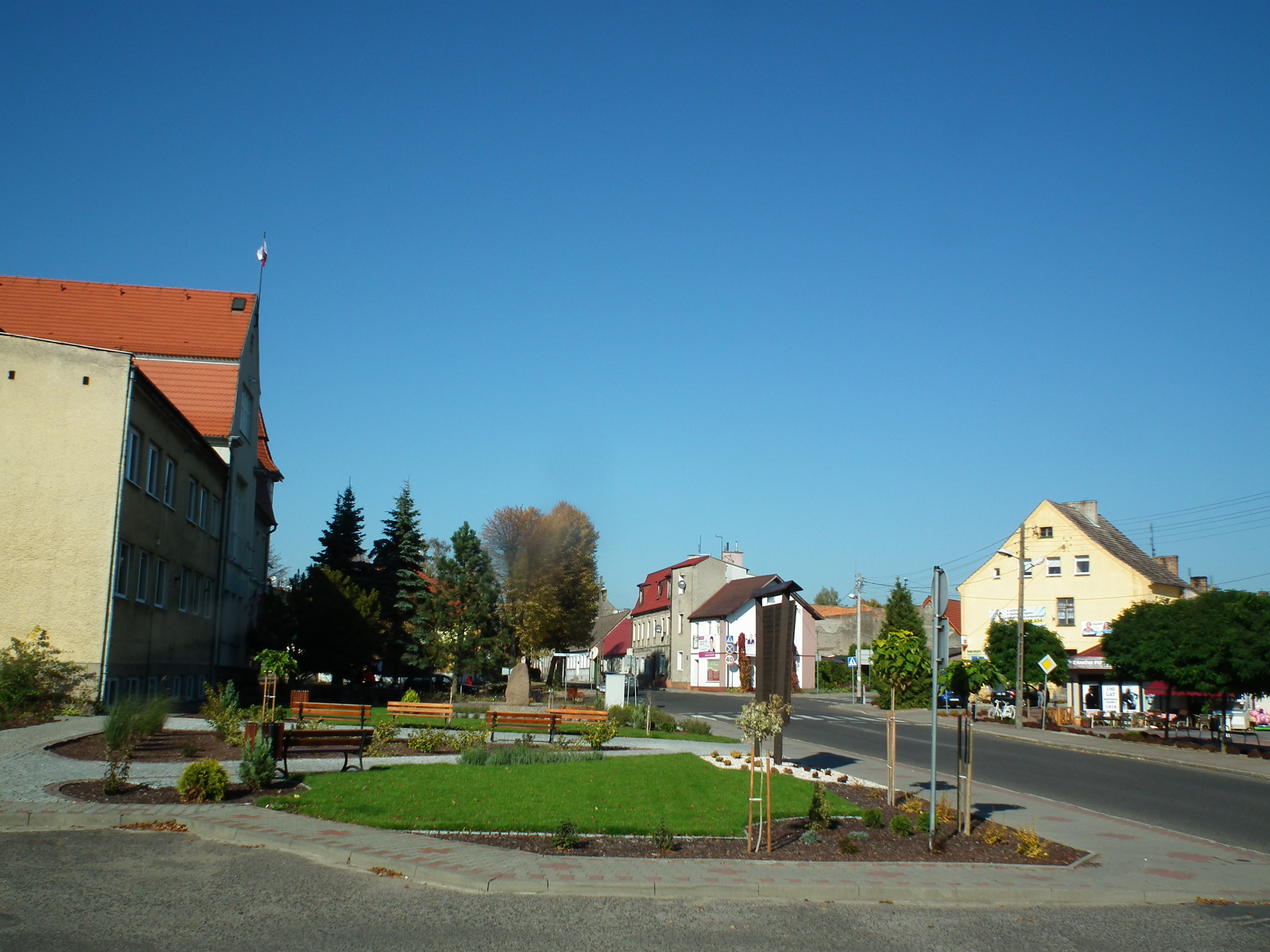 Widok miejski z Dobrzan.